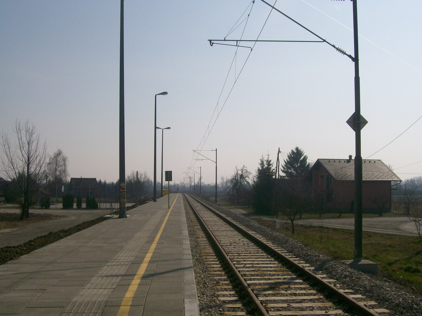 Željeznička stanica Harmica, na pruzi Savski Marof-Kumrovec, nakon elektrifikacije